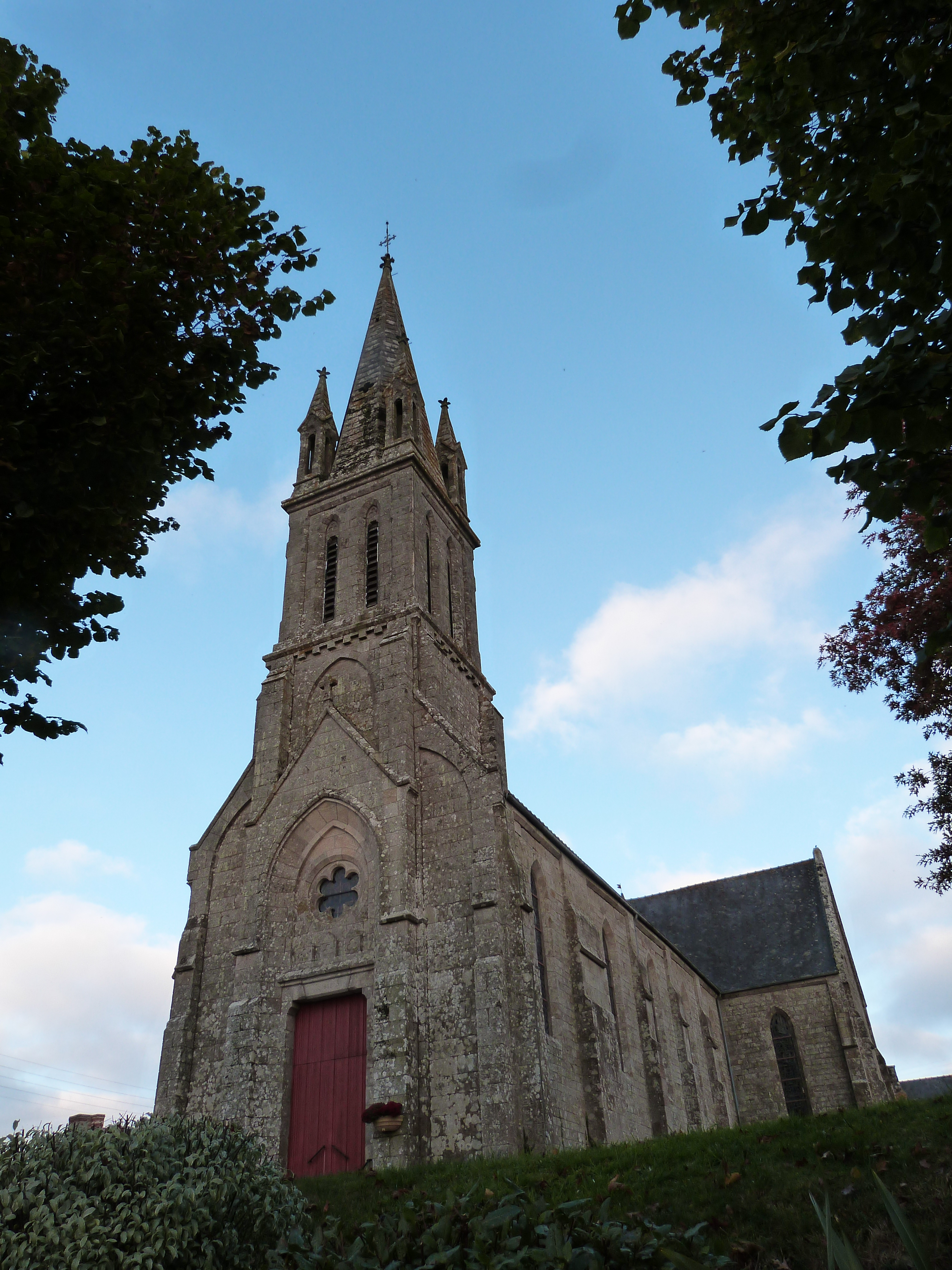 L'église Saint-Gilles à Saint-Gilles-du-Mené